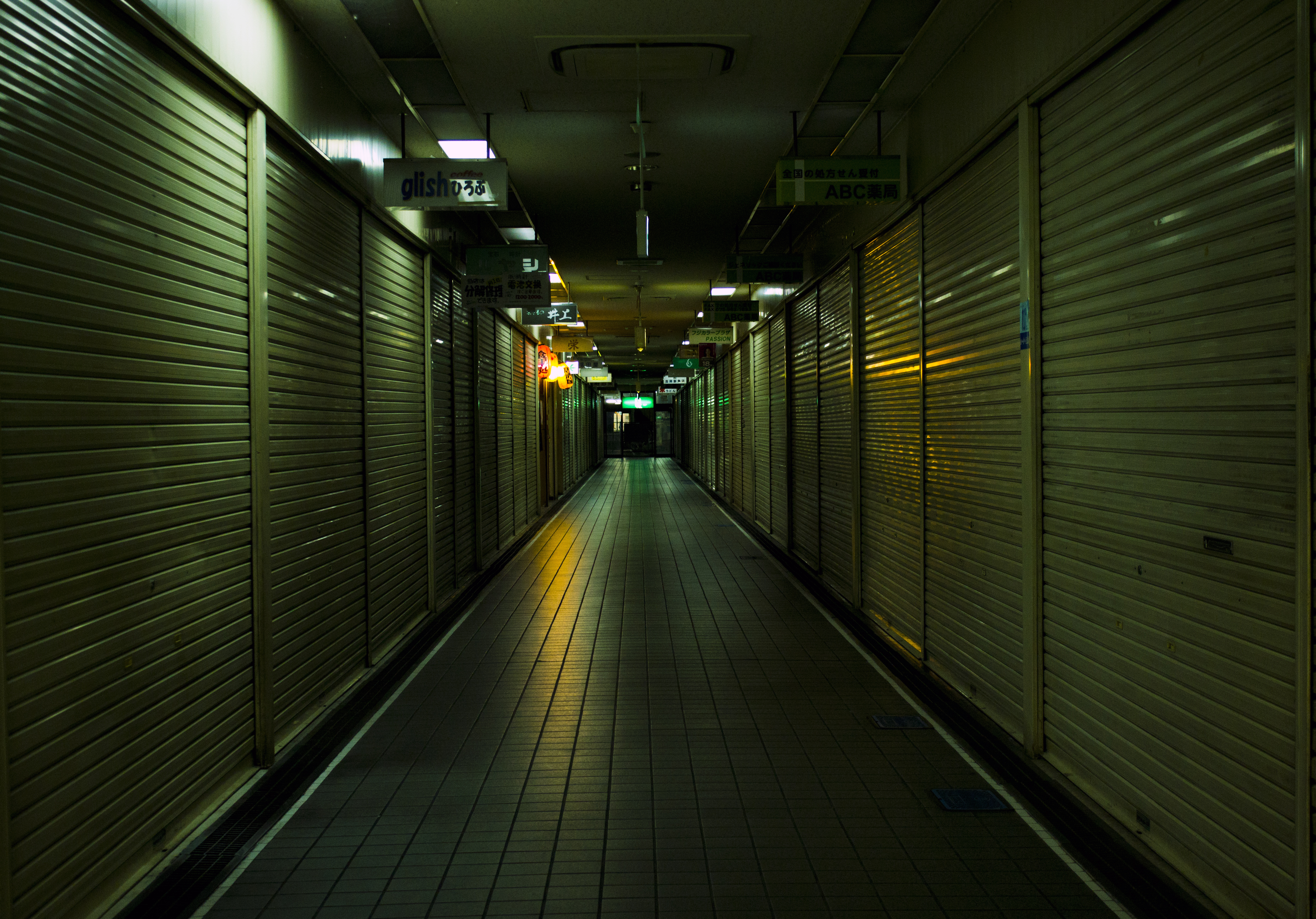 A "shutter-dori" (street) in Osaka.